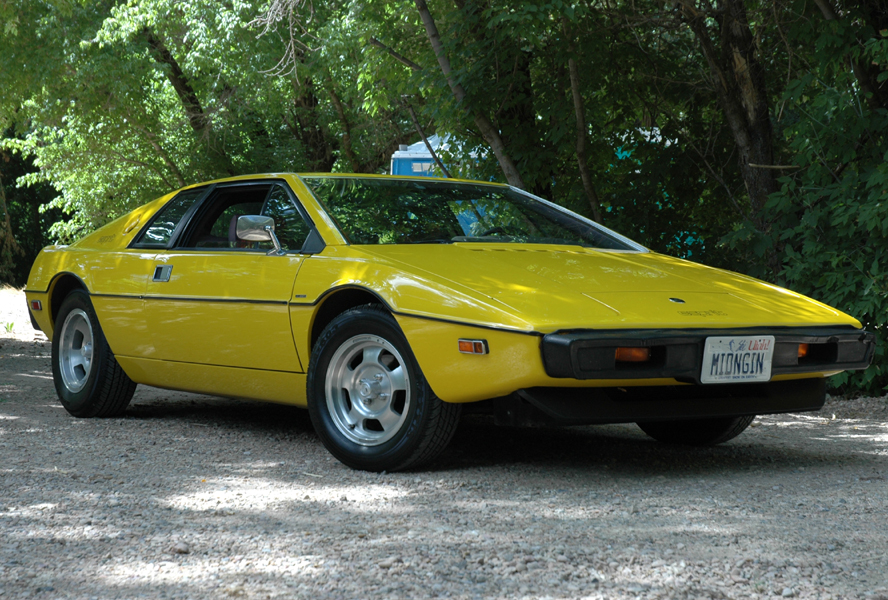 Lotus Esprit S1, 1977, Federal (USA) Version